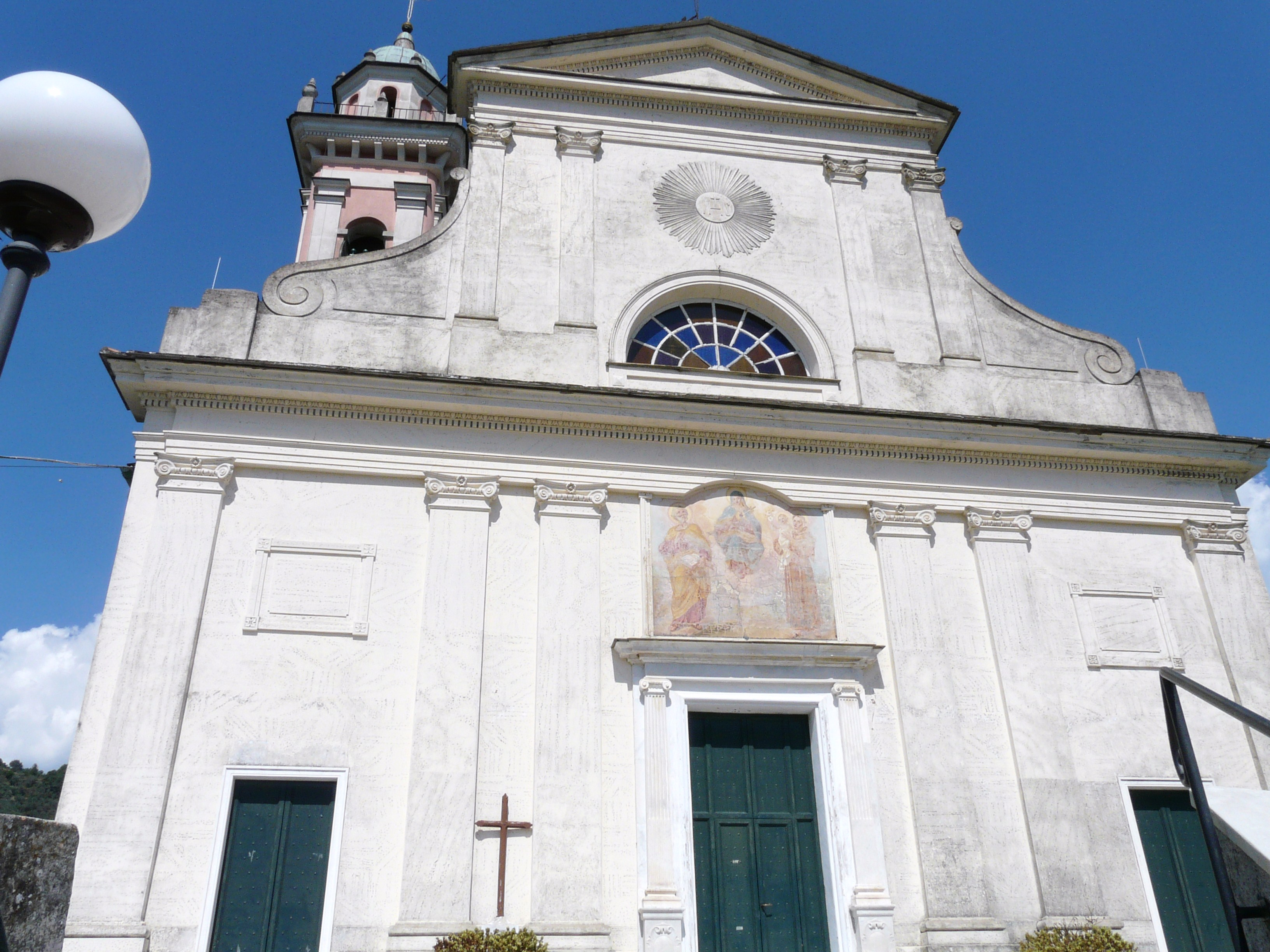 Chiesa di San Pietro, San Pietro di Sturla, Carasco, Liguria, Italia